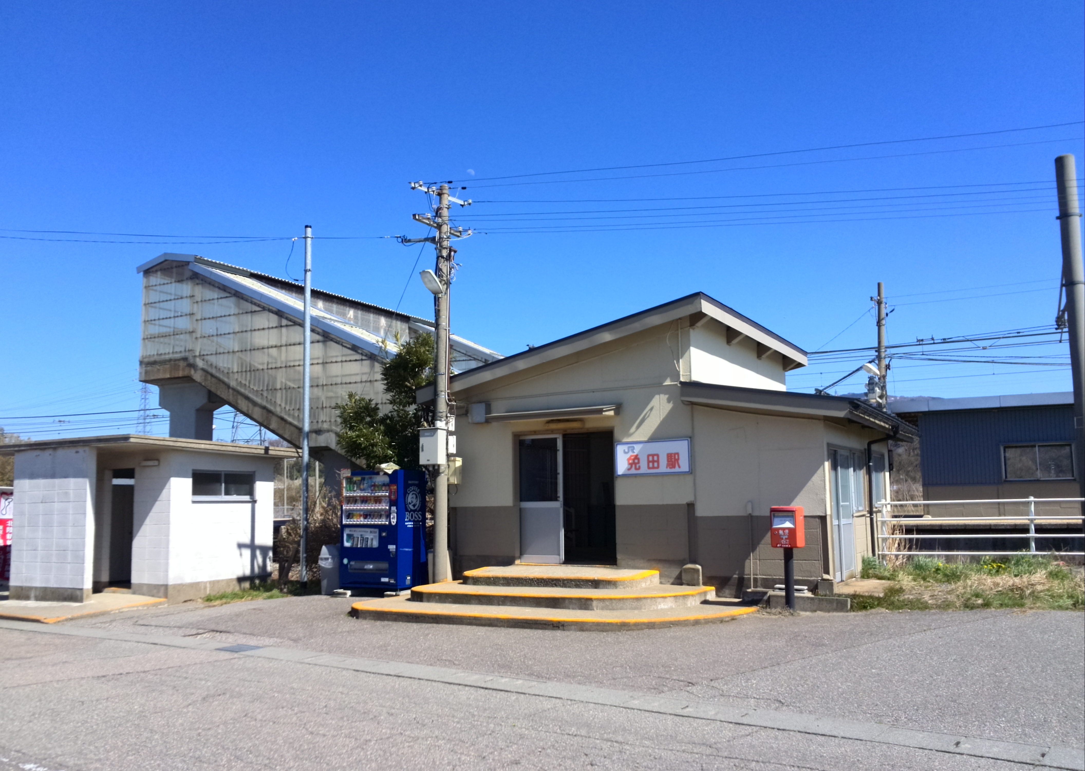 七尾線免田駅